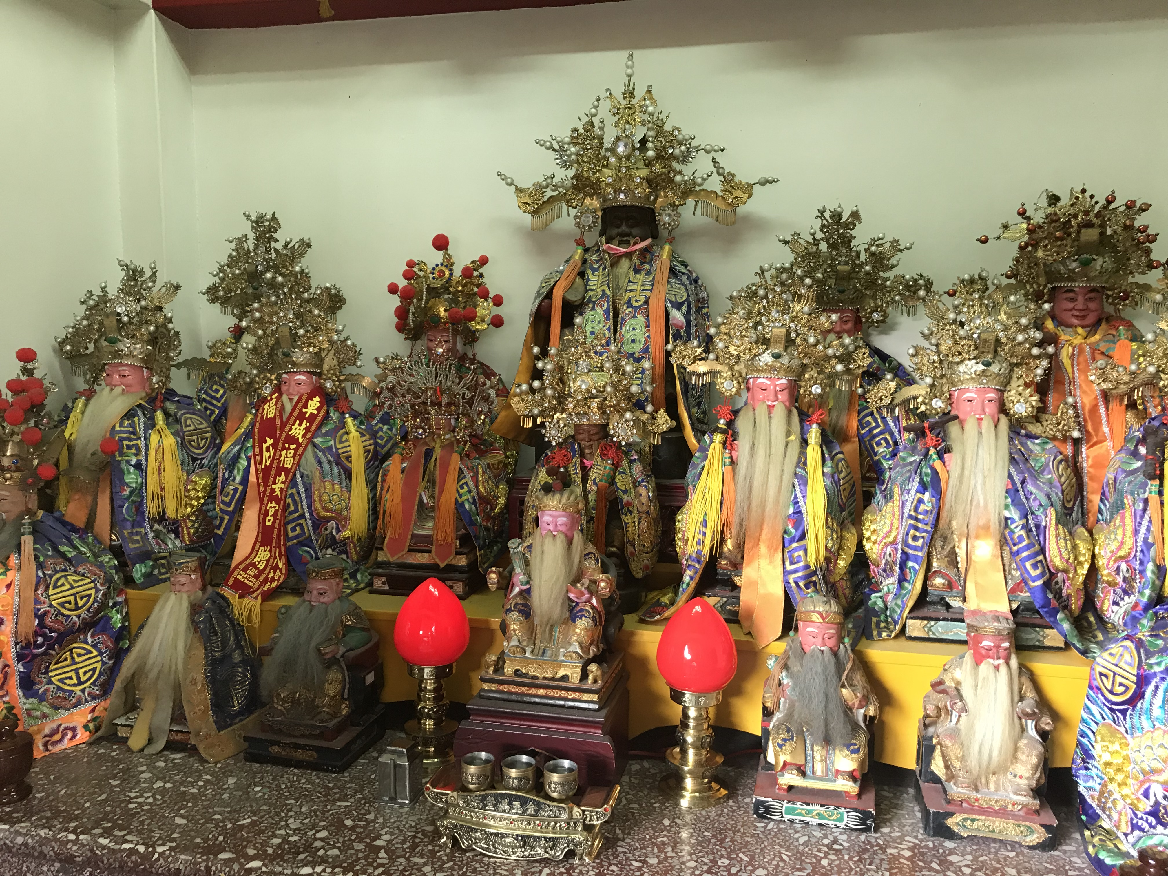 羅東中山公園福德廟土地公神像